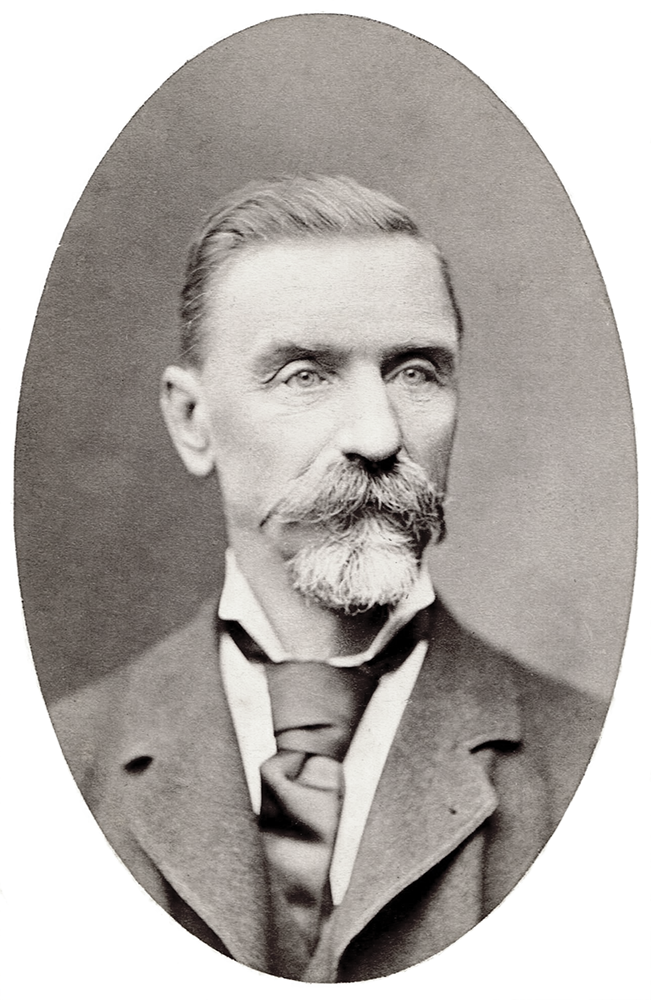 Wiktor Ignacy Godlewski w 1890 r.